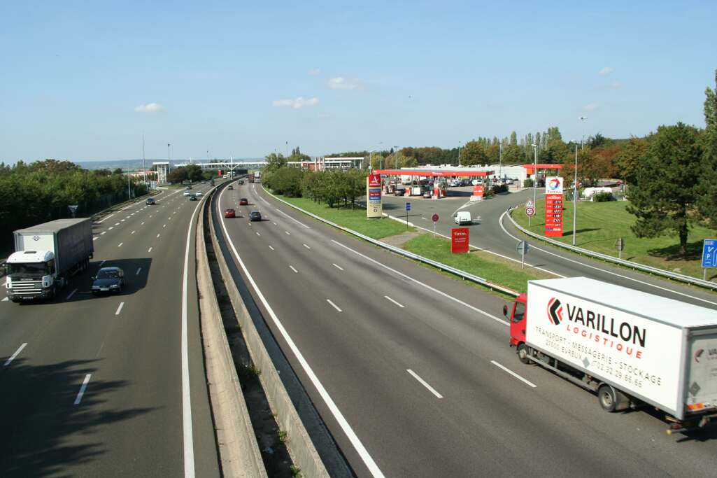 Autoroute A13 à Morainvilliers - Yvelines (France)